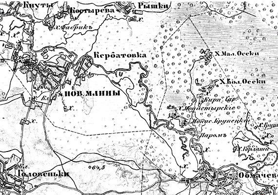 Скан карти Кербутівки та Нових Млинів XVII ст.